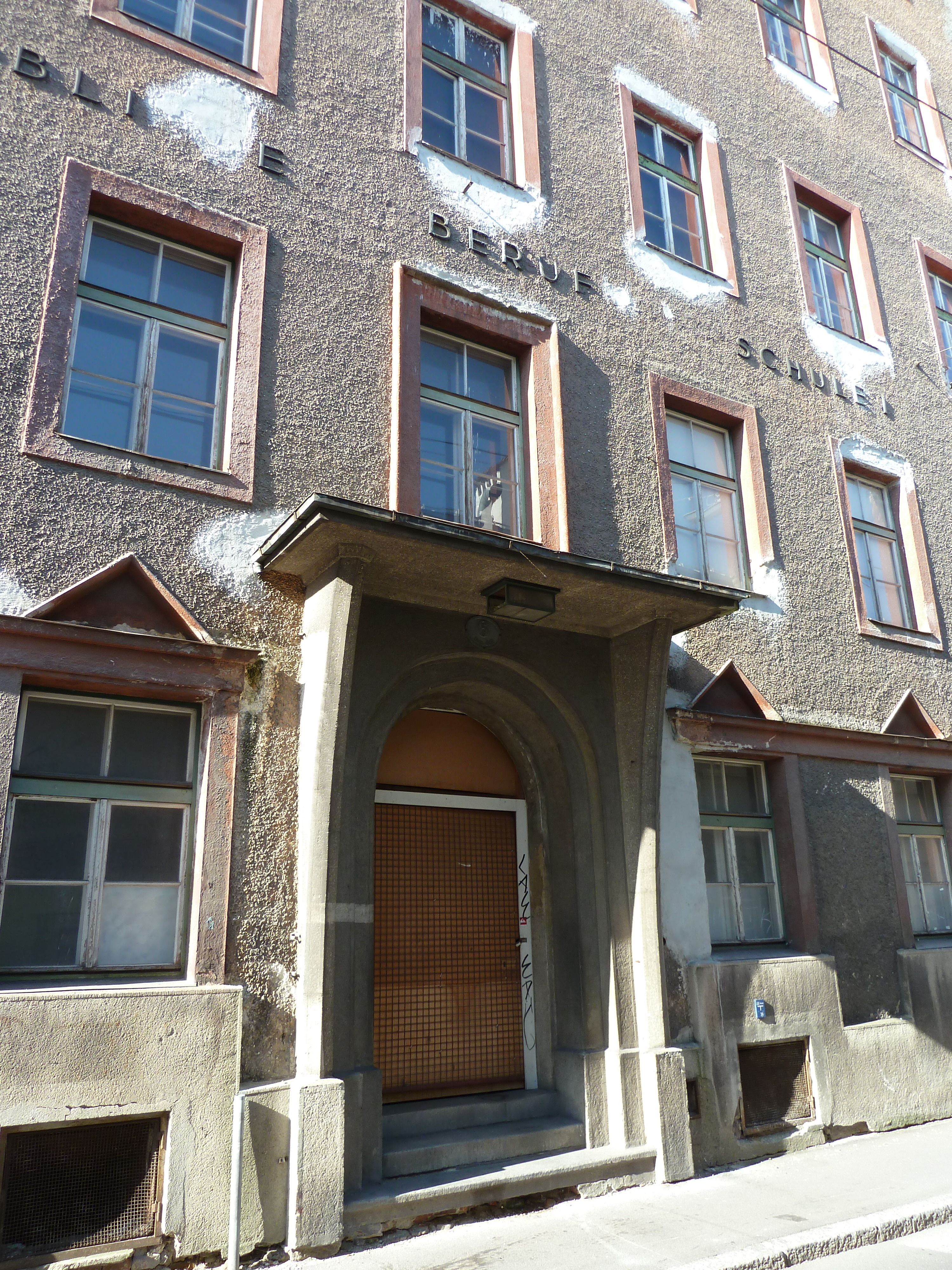 Berufsschule/Mitteltrakt